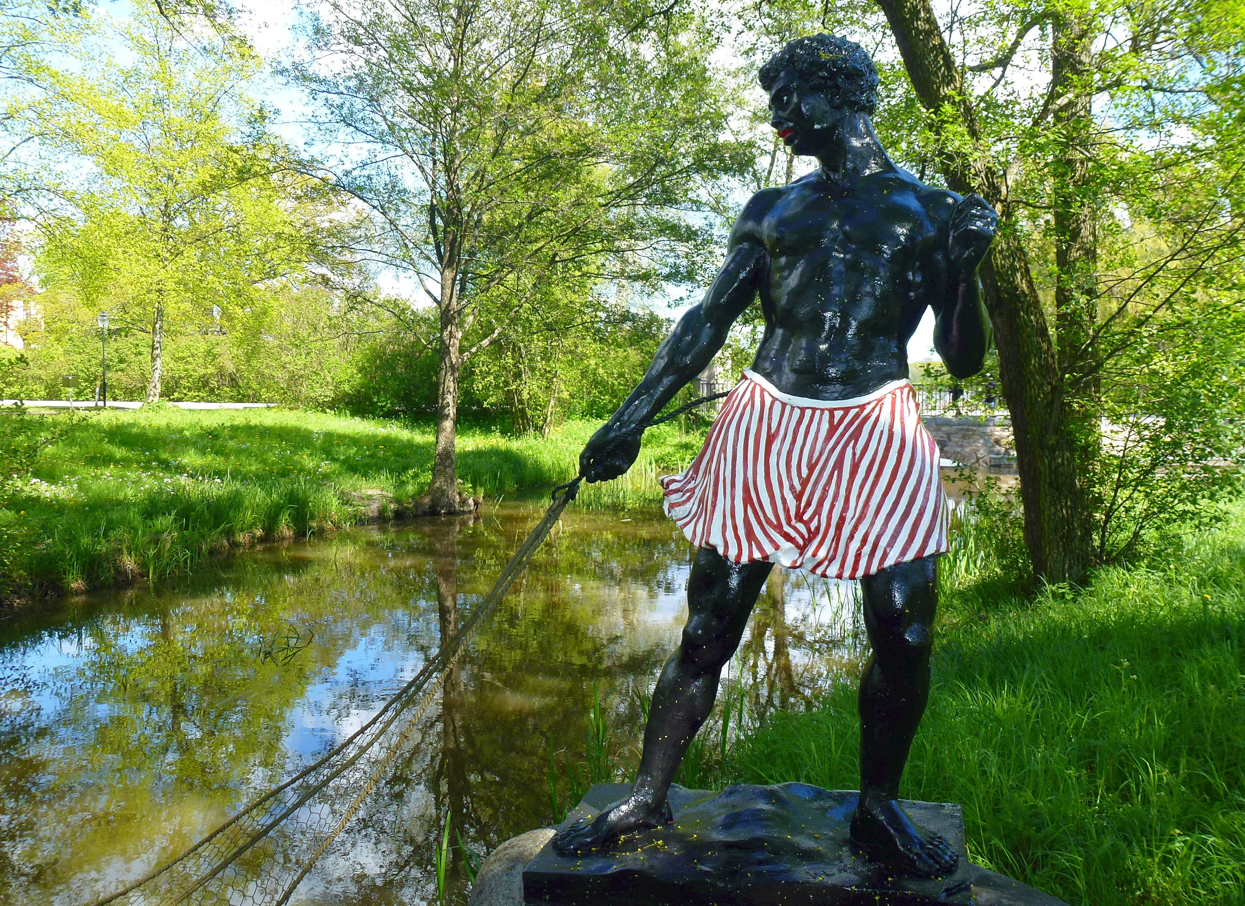 Morianbron i Ulriksdals slottspark